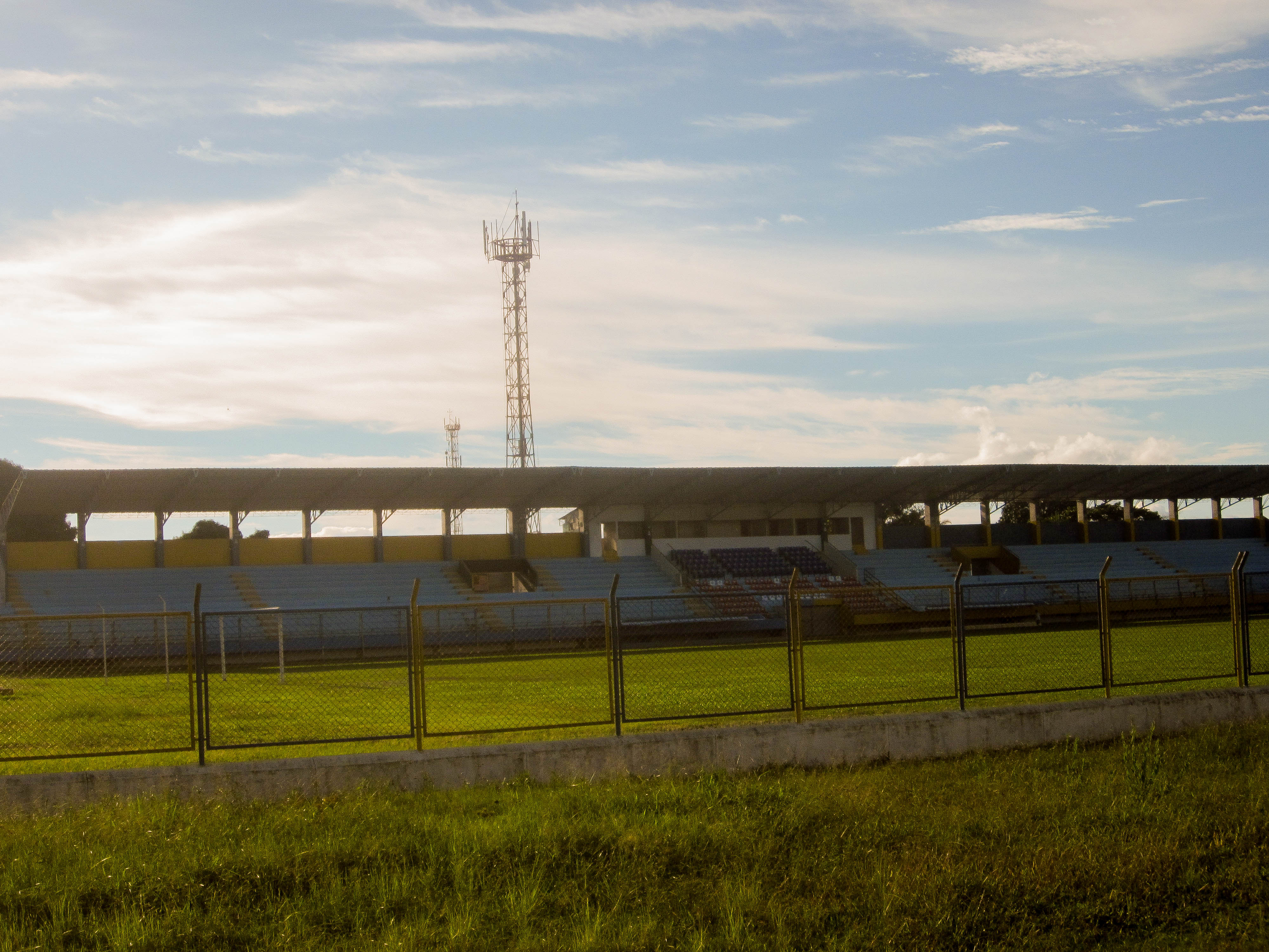 Tribunas del estadio IPD de Moyobamba